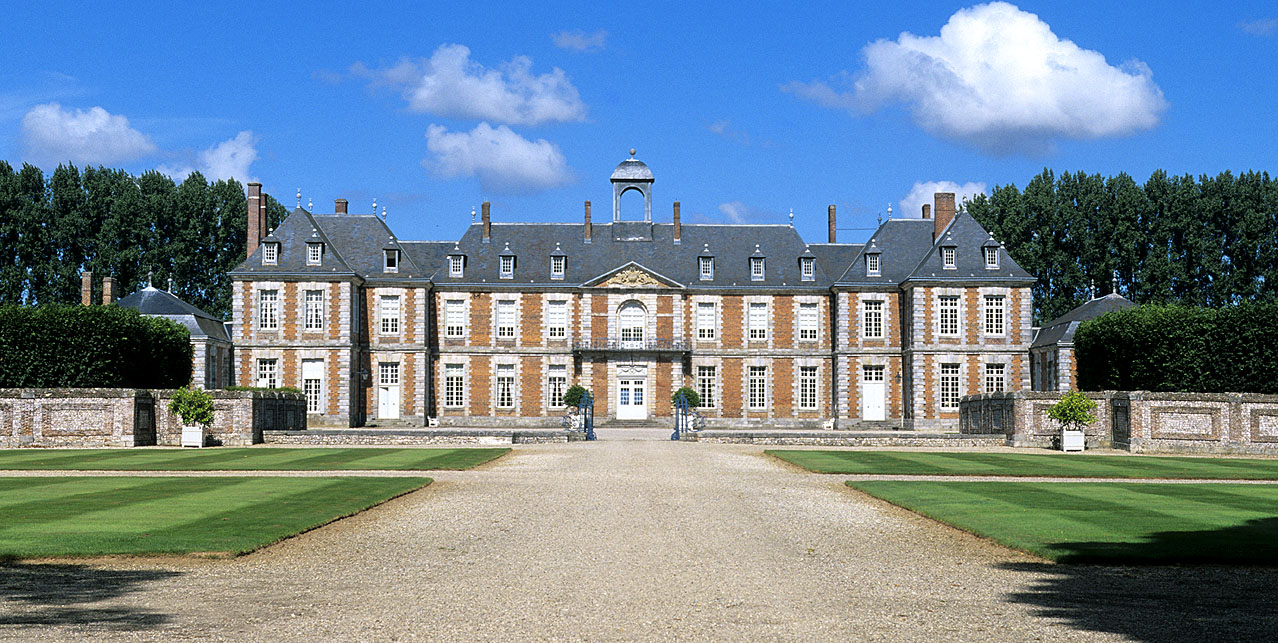 Château de Galleville (Classé) .